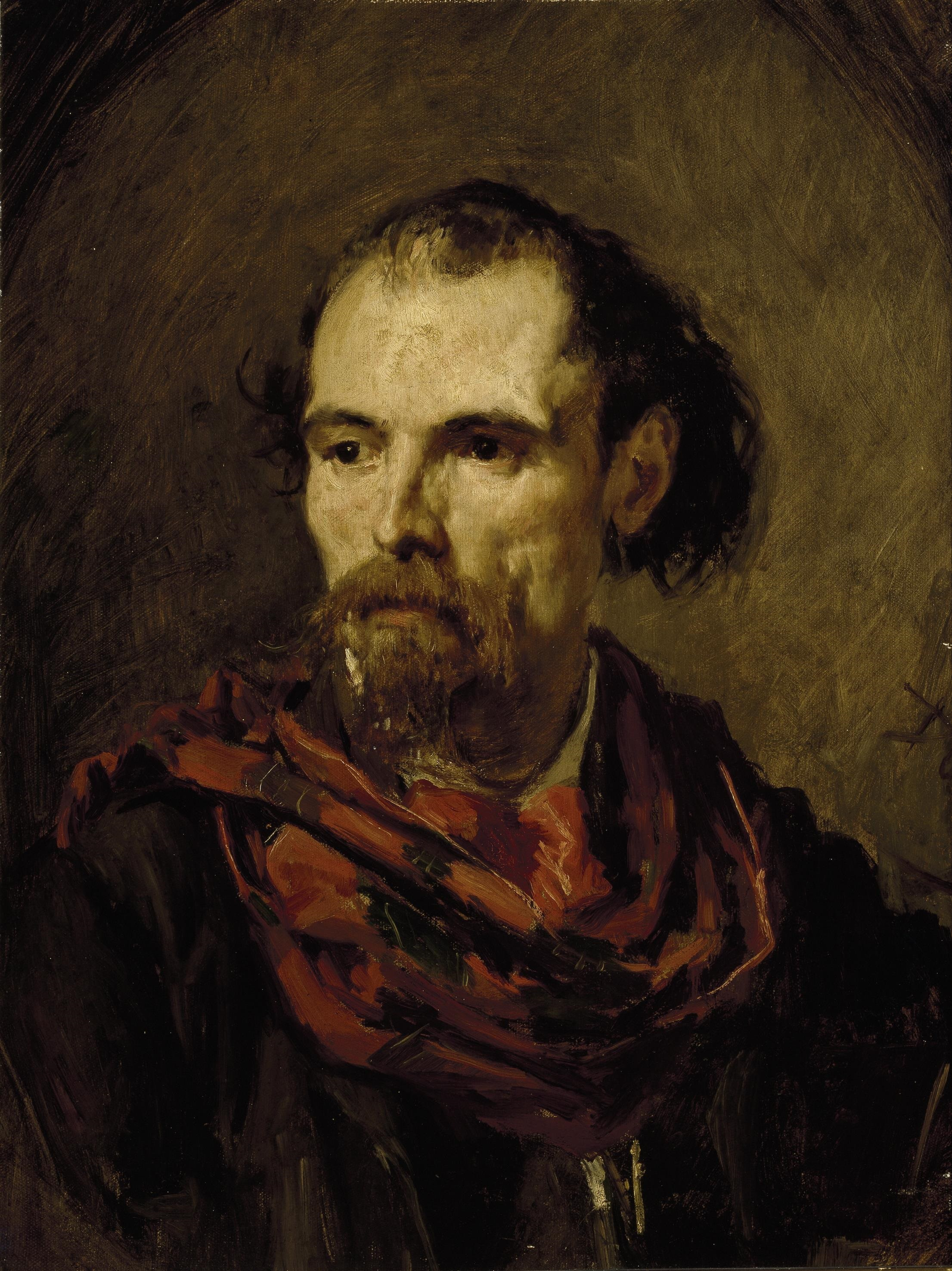 Retrato del escritor, periodista y crítico teatral español Peregrín García Cadena (1823-1882).